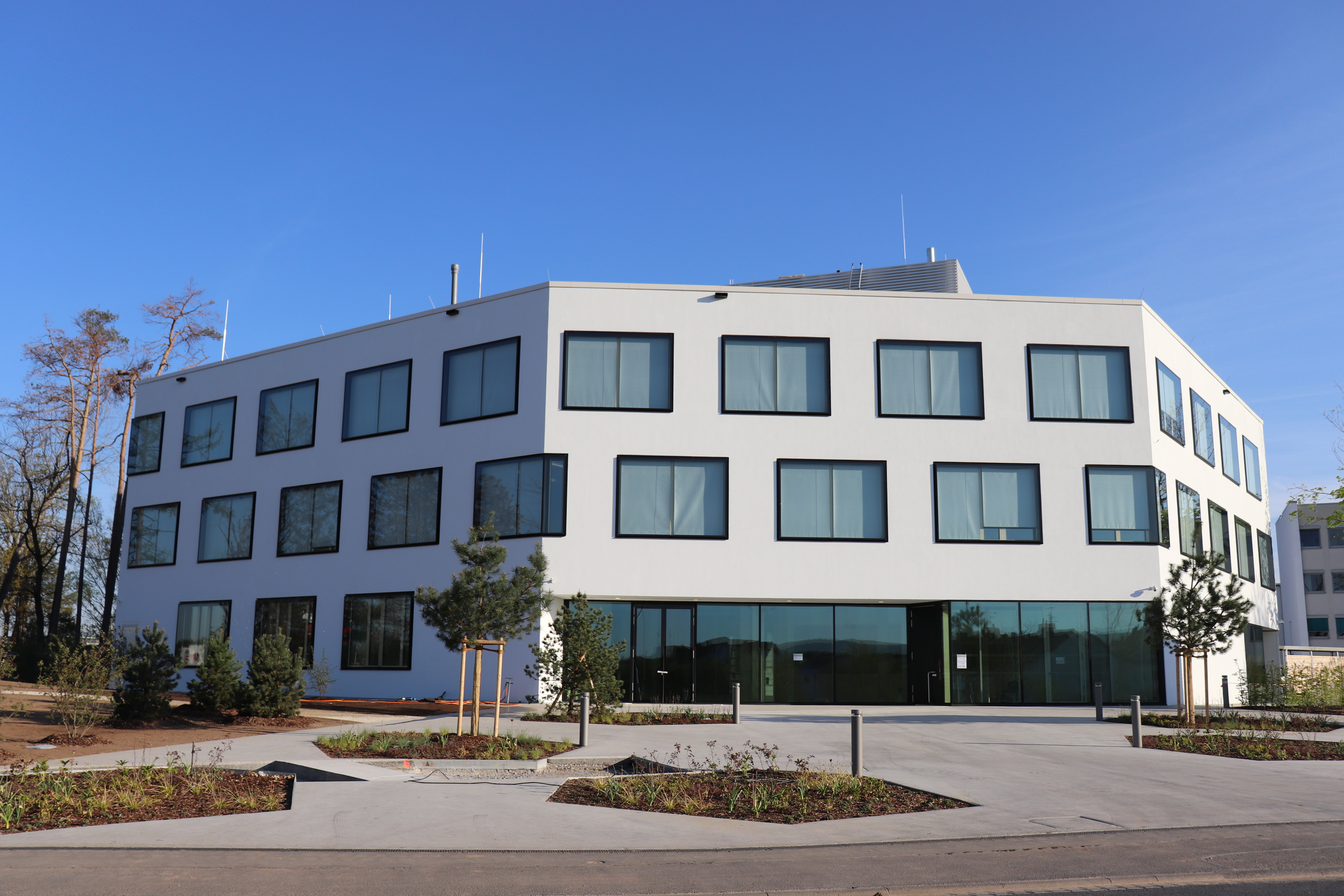 Blick auf den Neubau des Fraunhofer IWKS in Alzenau